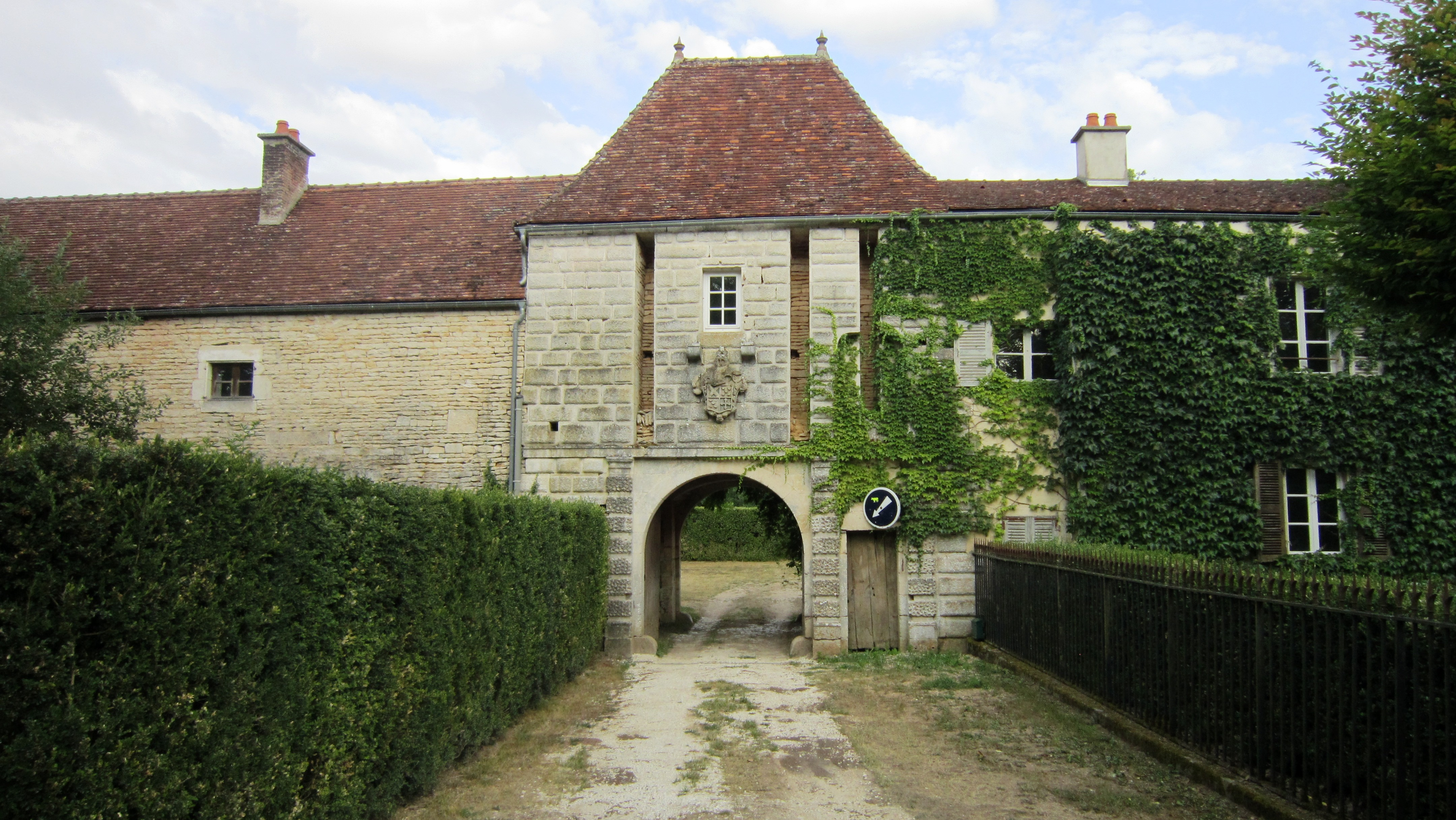 Entrée fortifiée du château de Crépan